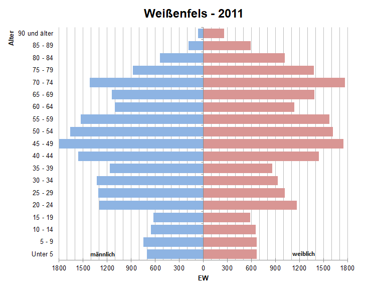 Bevölkerungspyramide der Stadt Weißenfels nach Zensus 2011.